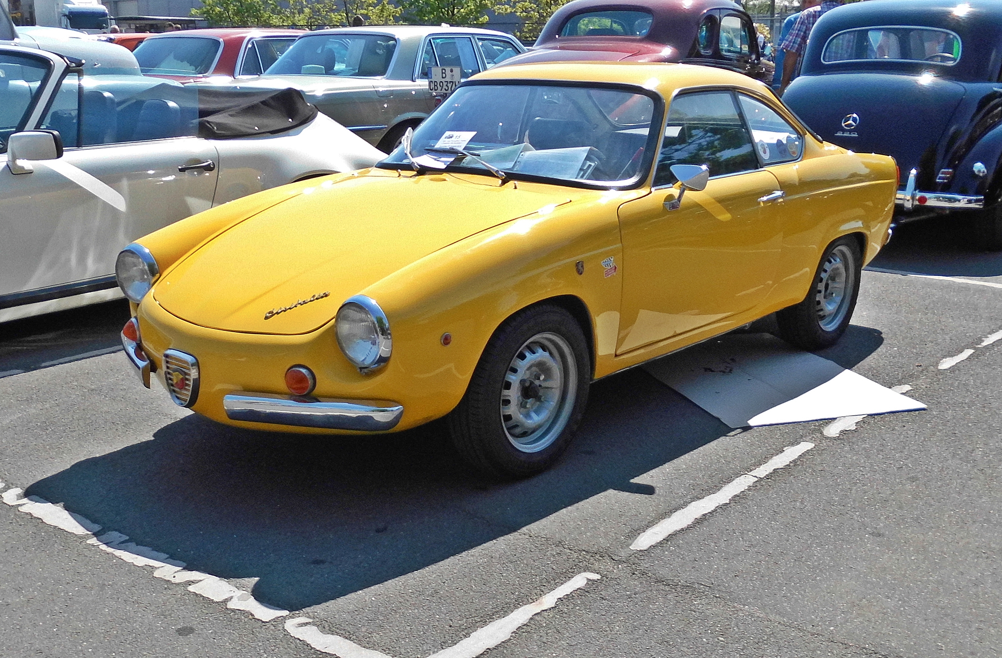 Oldtimer Berlin 2016